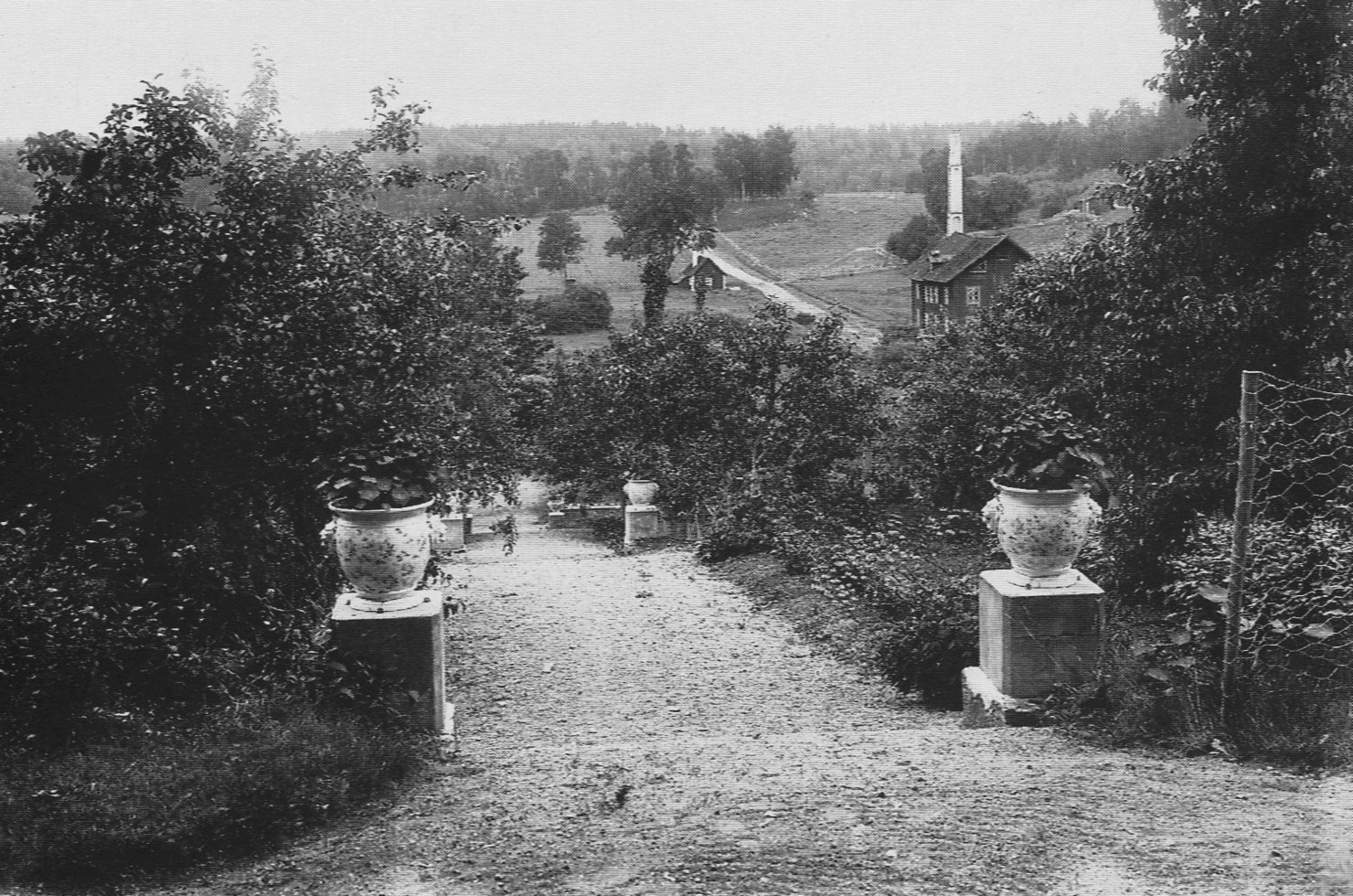 Utsikt grån Flemingsbergs gård mot söder, i bakgrunden syns ångkvarnen med sin höga skorsten